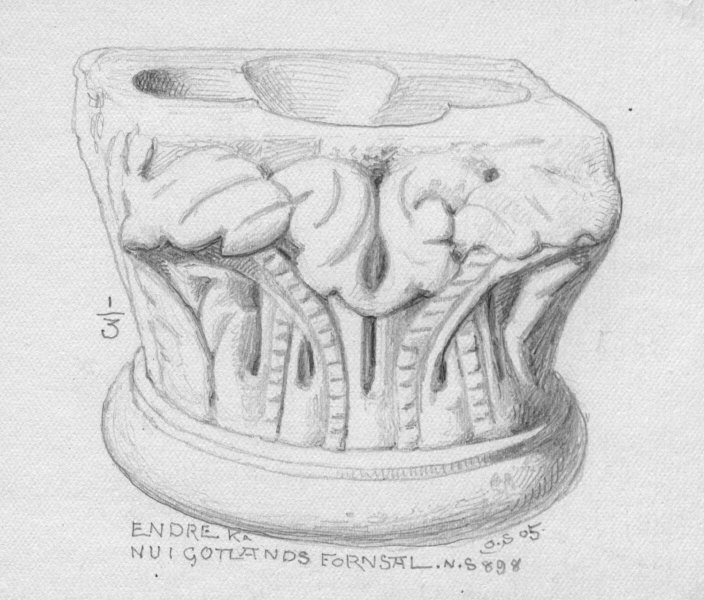 Piscina. Teckning av Olof Sörling 1905. Kategori: (11) Diverse Piscina. Teckning av Olof Sörling 1905.